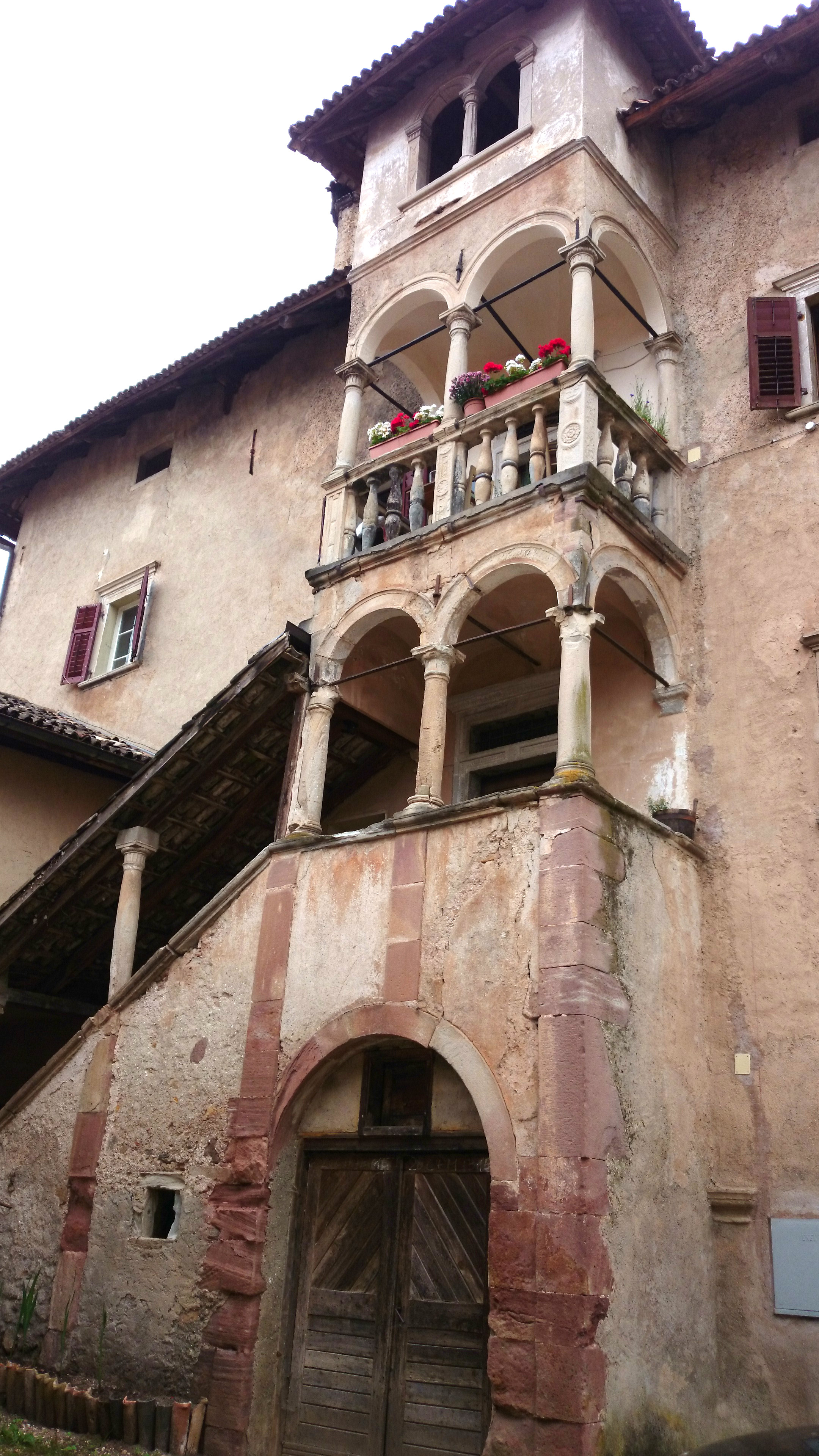 Ansitz Mühlburg in Pfuß, Kaltern; überdachte Freitreppe und Loggia